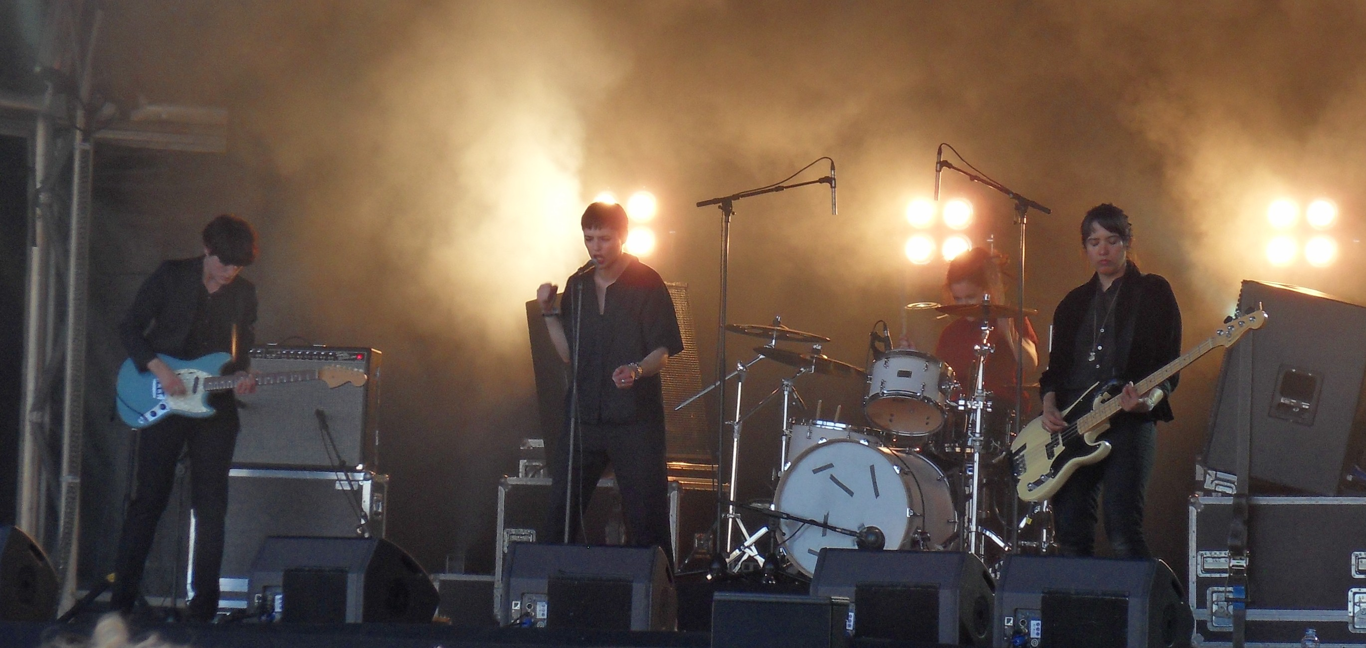 Die Band "Savages" auf dem Festival Primavera Sound 2013 in Barcelona